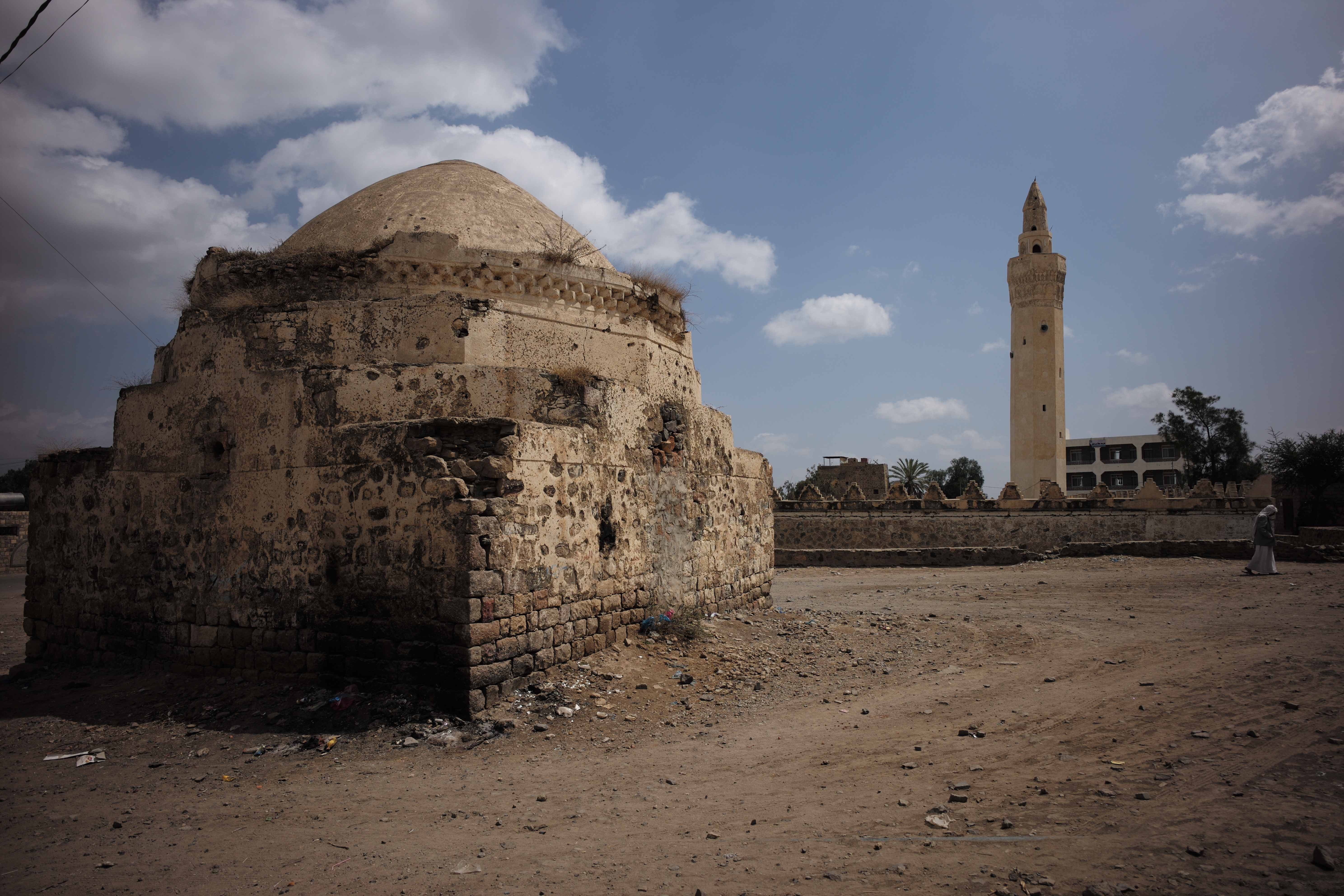 Jennad Mosque